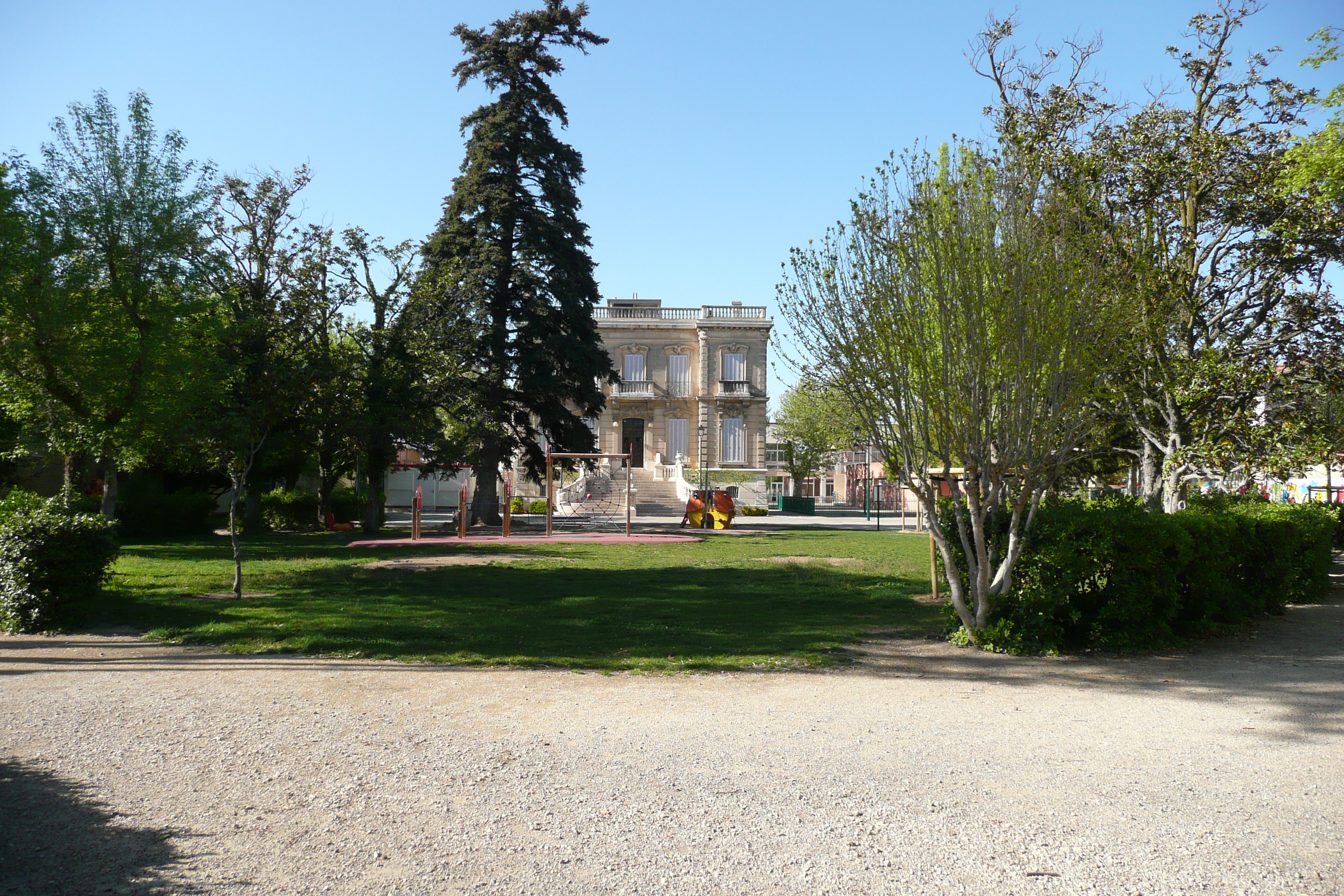 Ecole maternelle Michelet à Salon-de-Provence.